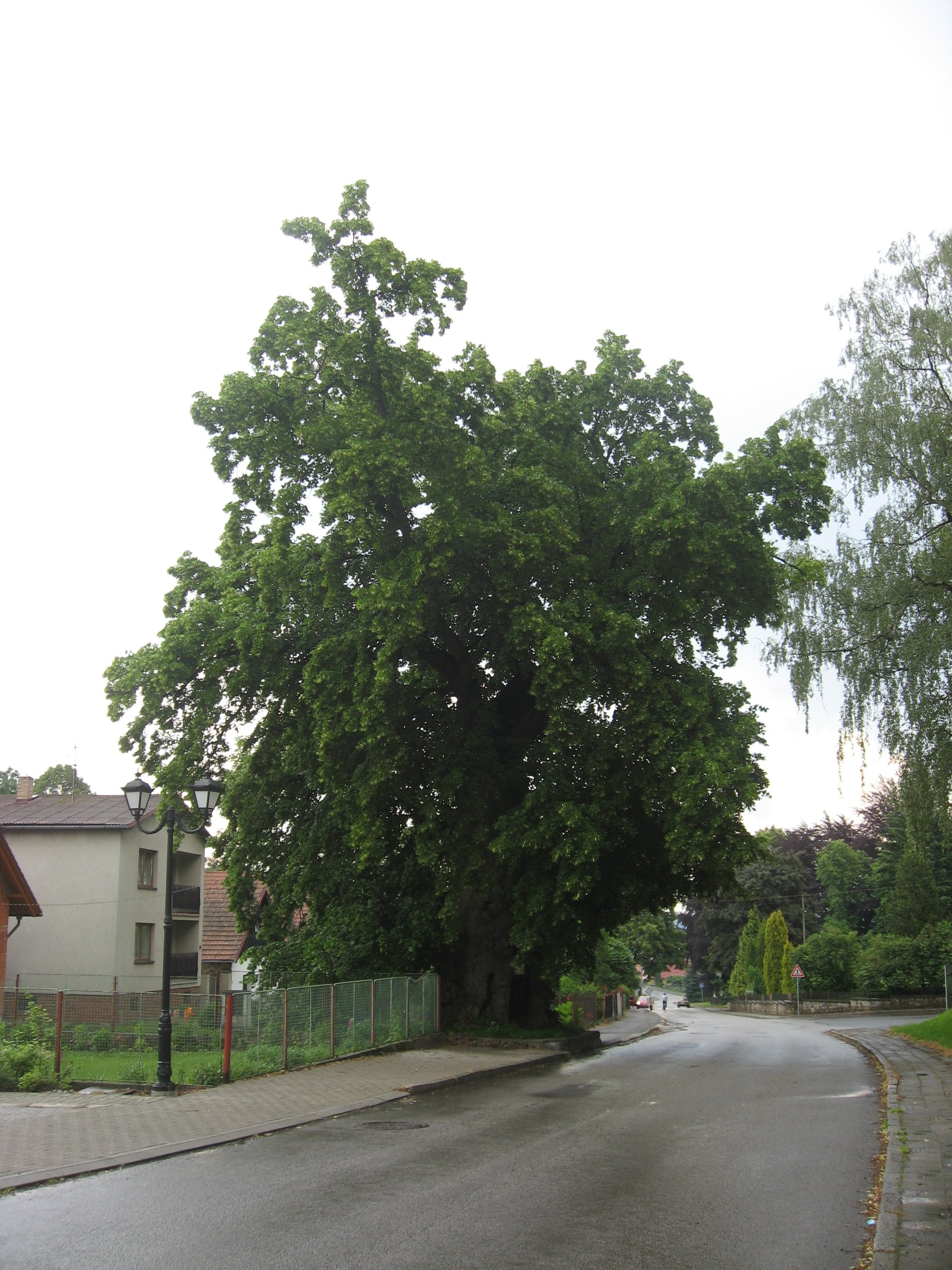 Jiřická lípa (Jiřice, okres Pelhřimov)